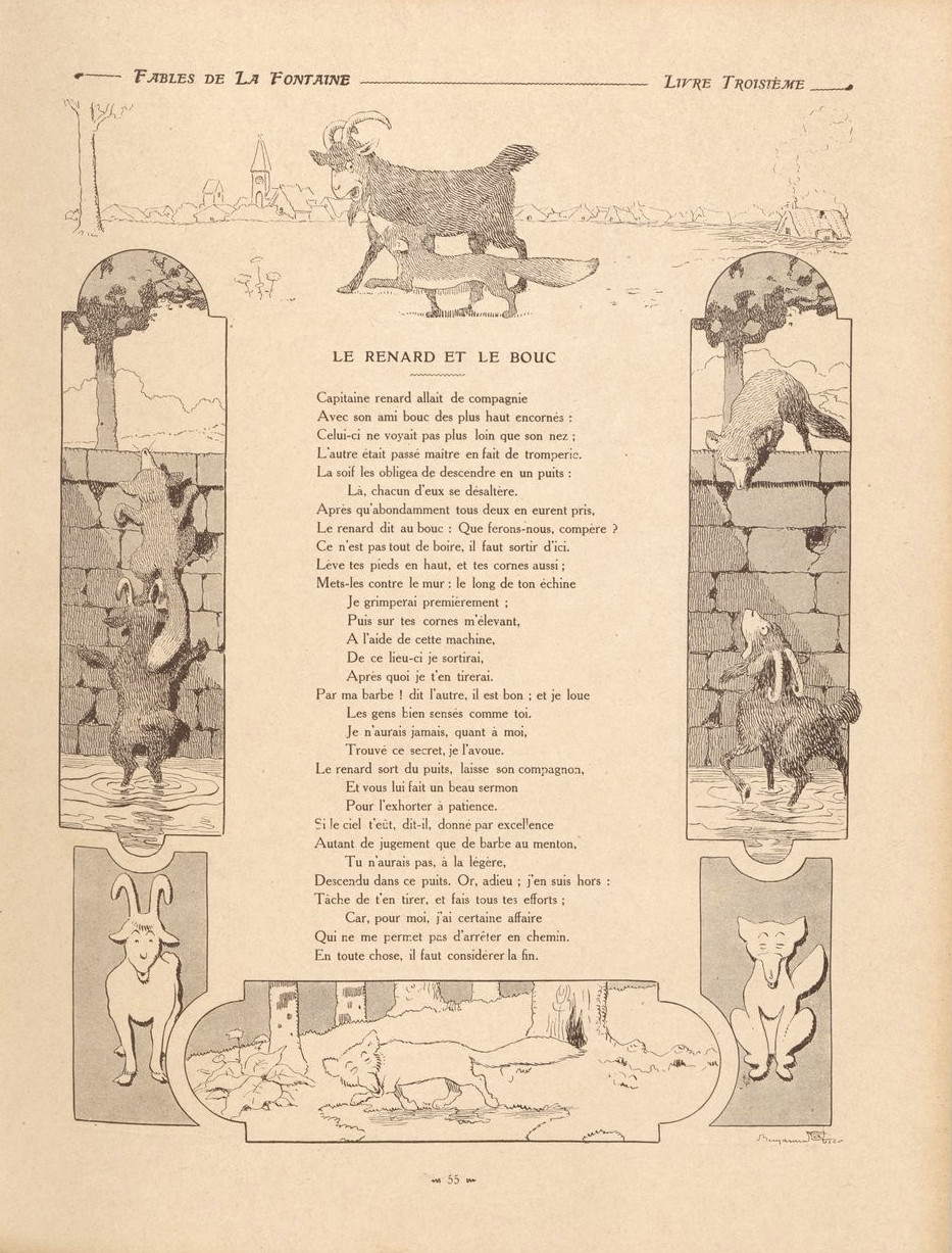 Fables de La Fontaine illustrées par Benjamin Rabier : Le renard et le bouc.